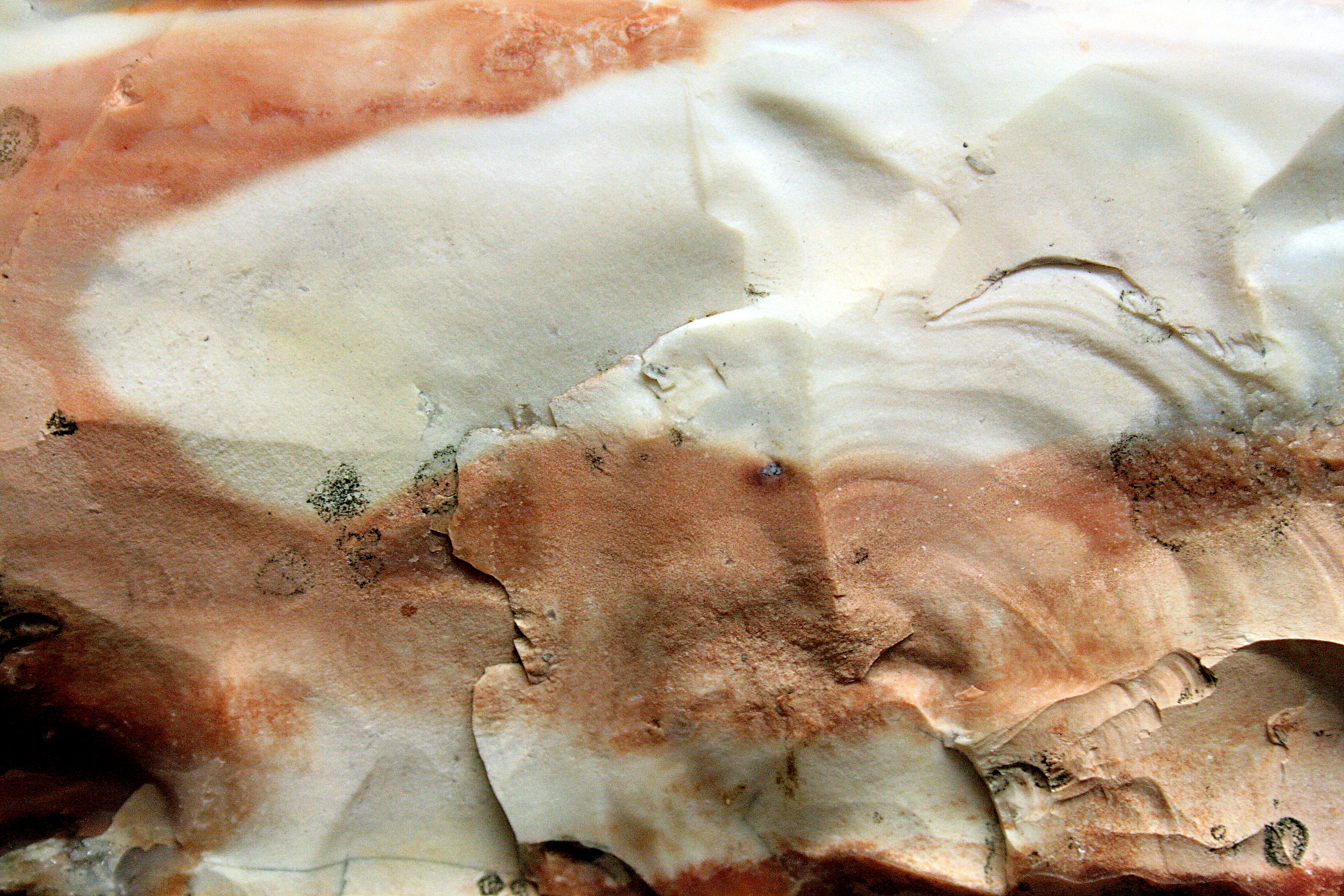 Stöðvarfjörður: Quarz (Steinemuseum Petra Sveinsdóttir)